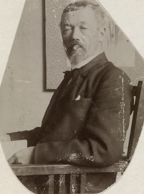 Ludvig Skramstad, portrett, mann, kunstmaler, sittende halvfigur, sigar.